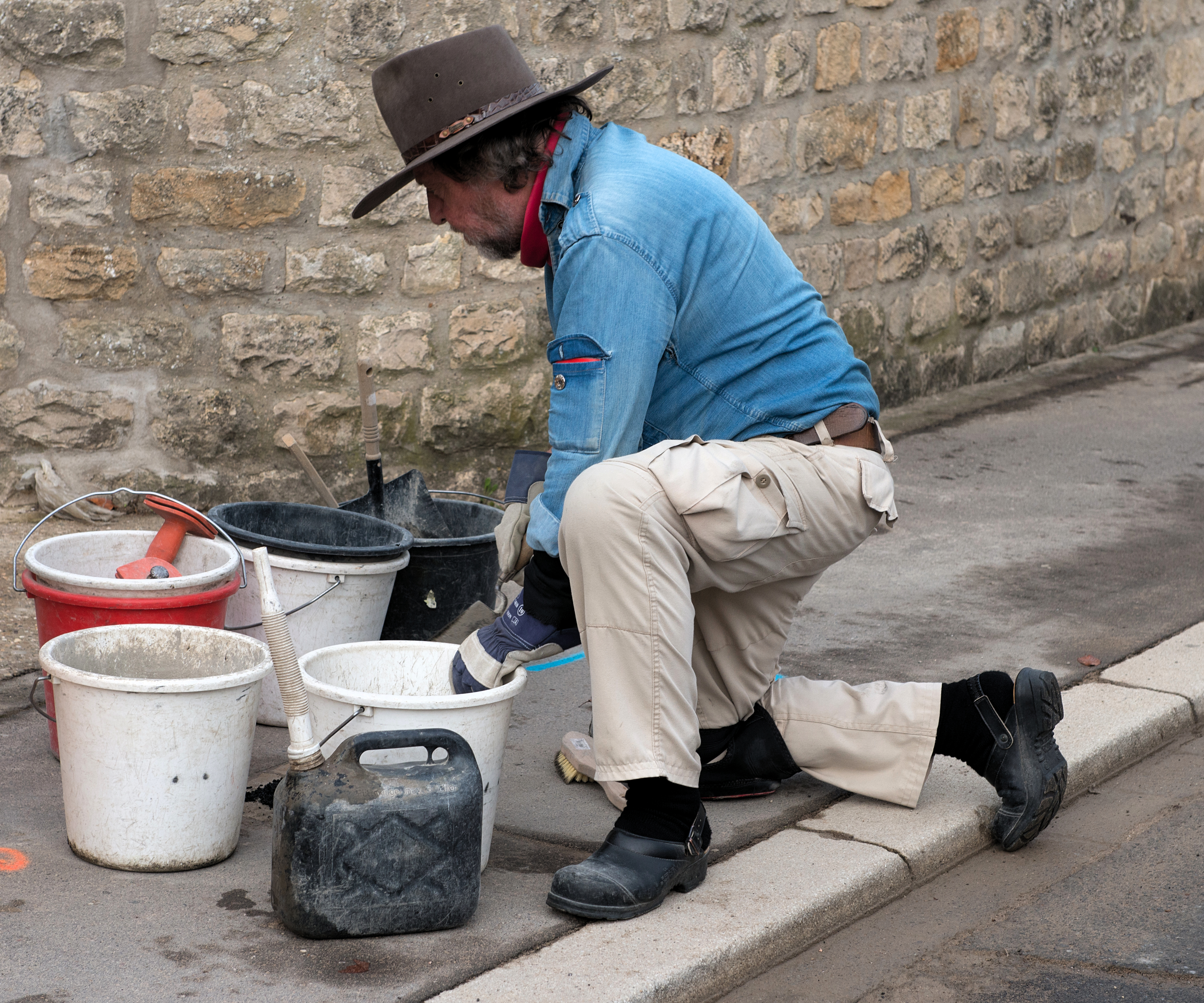 Als ofschléissend Aktioun am Kader vu "Mémoires communes - verfollegt, verdrängt, vergiess" huet d'Gemeng Munneref de 6. November 2015 eelef Stolpersteng vum däitsche Kënschtler Gunter Demnig verleeë gelooss. 18 Lokalassociatiounen hunn de Parrainage iwwerholl. De Gunter Demnig verleet de Stolperstee fir de Bernard Weber De Bernard Weber, gebuer de 15. Oktober 1890 zu Haler, huet mat senger Fra, der Louise Molitor, an der Ellenger Strooss (haut rue John-Grün) zu Munneref gewunnt. D'Koppel hat ee Jong, de Roger, gebuer de 16. Abrëll 1923, wouduerch hien zu der Altersklass gehéert huet déi als éischt zwangsrekrutéiert goufen. Am Éischte Weltkrich huet de Bernard Weber an der franséischer Friemelegioun gekämpft, woufir hien 1922 mat der Médaille militaire ausgezeechent gouf. De Bernard Weber war ee vun de Käpp an der Munnerefer Resistenz. Den 22. Oktober 1943 gouf hie vun der Gestapo verhaft an an de Prisong am Gronn agespaart. Vu do gouf hien den 2. November 1943 an d'KZ Hinzert verschleeft, wou hin duerch d'sadistesch Brutalitéit vun den SS-Verbriecher de 25. November 1943 ëmkënnt. De 24. Oktober 1944, op der éischter Gemengerotsëtzung no der Liberatioun, gouf op Propositioun vun der Unio'n decidéiert d'"Place Flesgin" (Grous Plaz) a "Place Bernard-Weber" ëmzebenennen. De 25. November gouf d'Plaz feierlech ageweit. Seng stierflech Iwwerreschter goufen am September 1946 um Munnerefer Kierfecht begruewen. De Bernard Weber gouf posthum mam Ordre de la Résistance ausgezeechent.